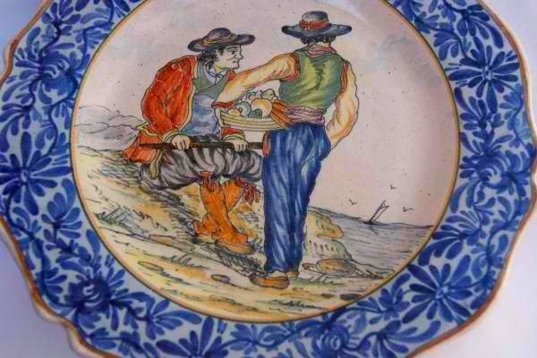 Assiette à décor régionaliste par Béatrix Pouplard, Malicorne, France, XIXe siècle.